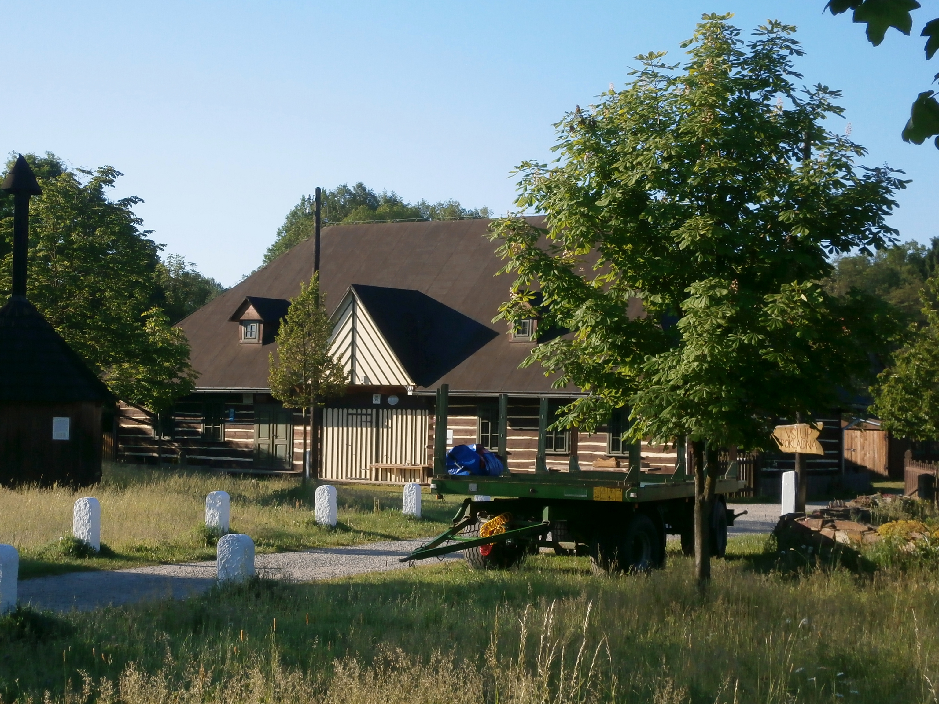 Replika zájezdního hostince Na Špici na Pražském Předměstí